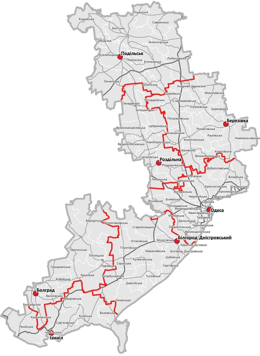 Карта адміністративно-територіального поділу Одеської області 2020